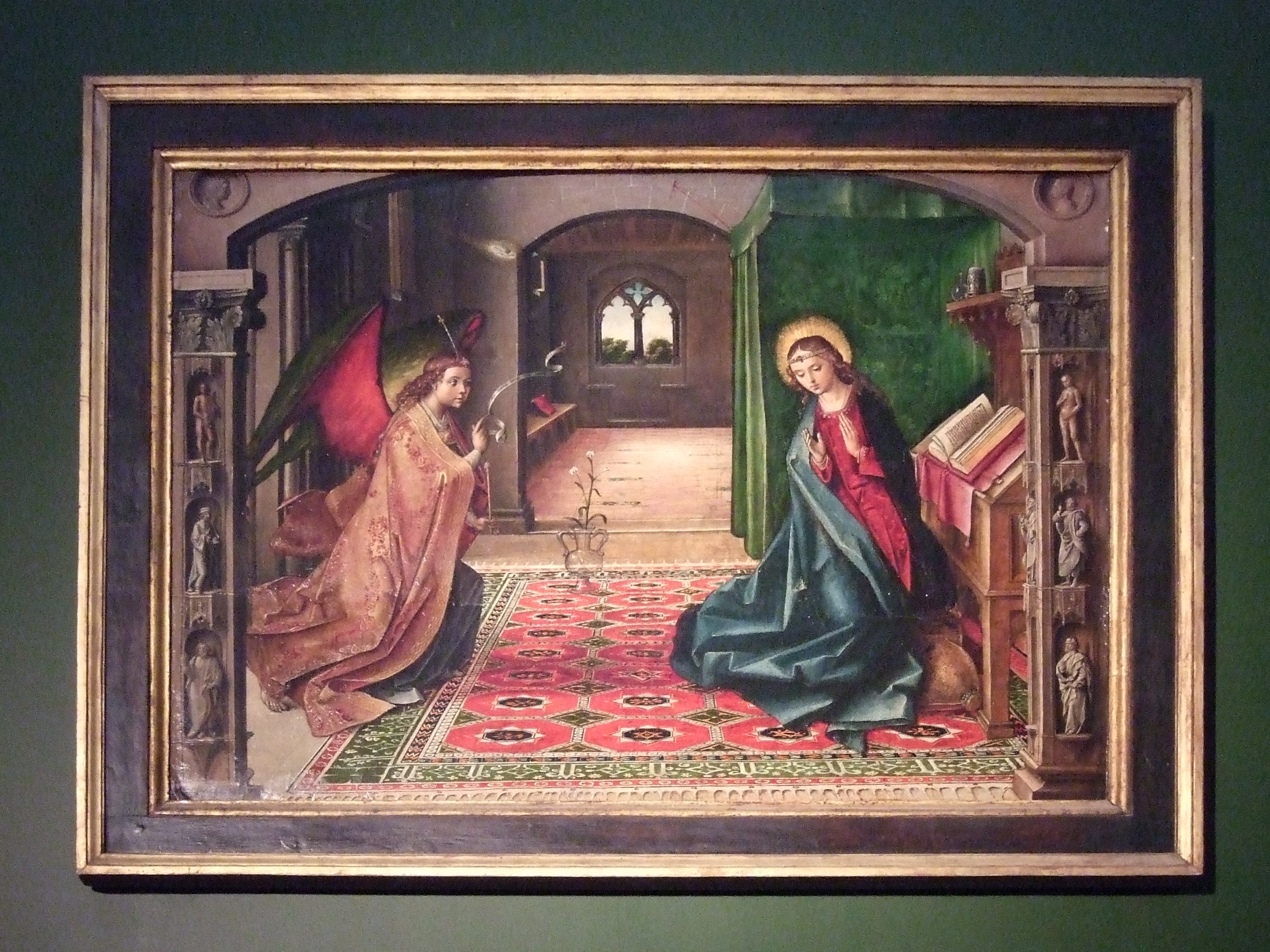 La obra representa el momento en que el arcángel San Gabriel anunció a la Virgen María que sería la madre del Mesías prometido por Dios al pueblo judío, Jesucristo.